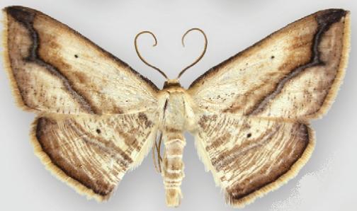 Campatonema yanayacua male